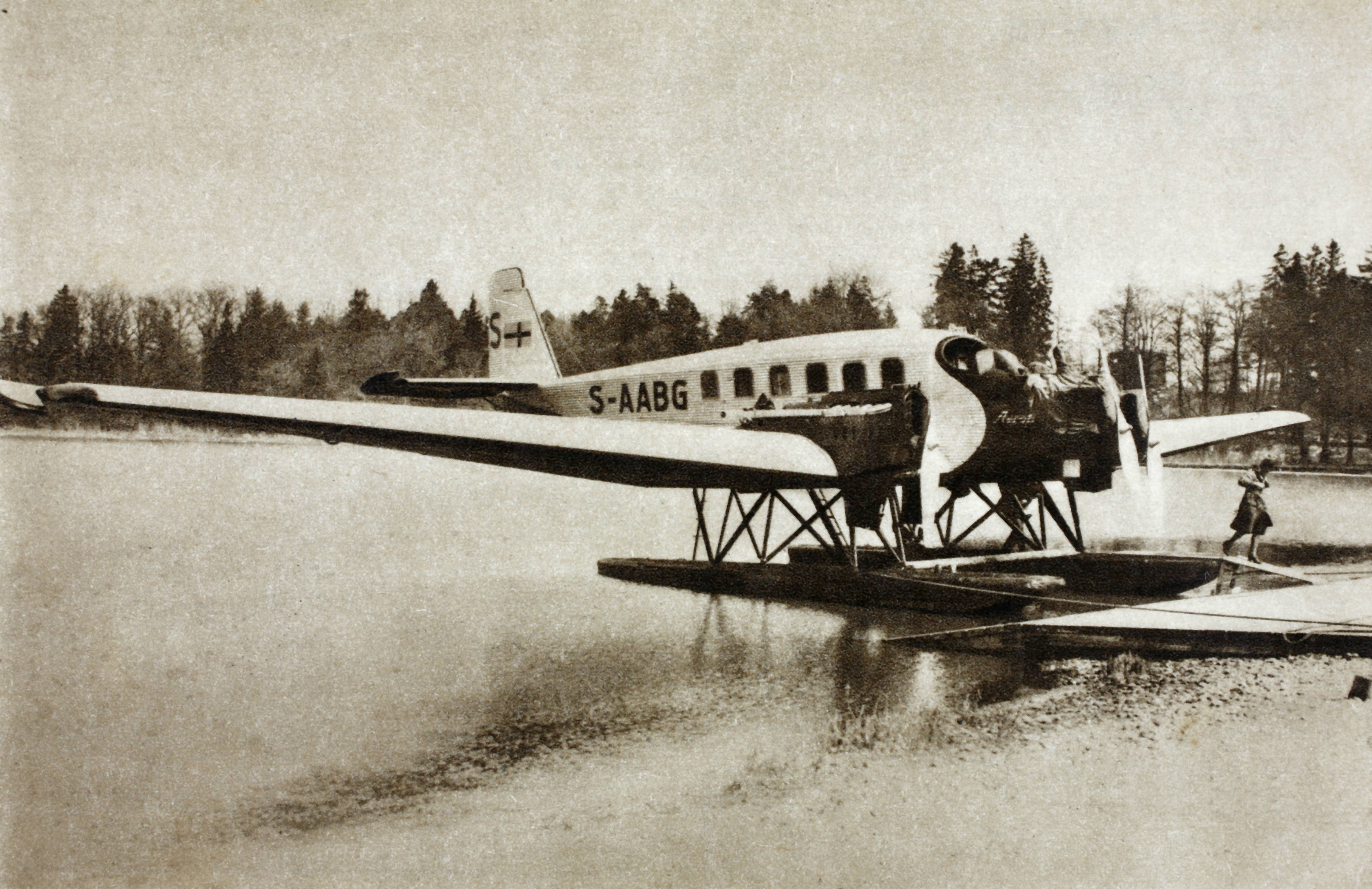 Junker G 24, S-AABG, Uppland, ABA aircraft during 1927-1932